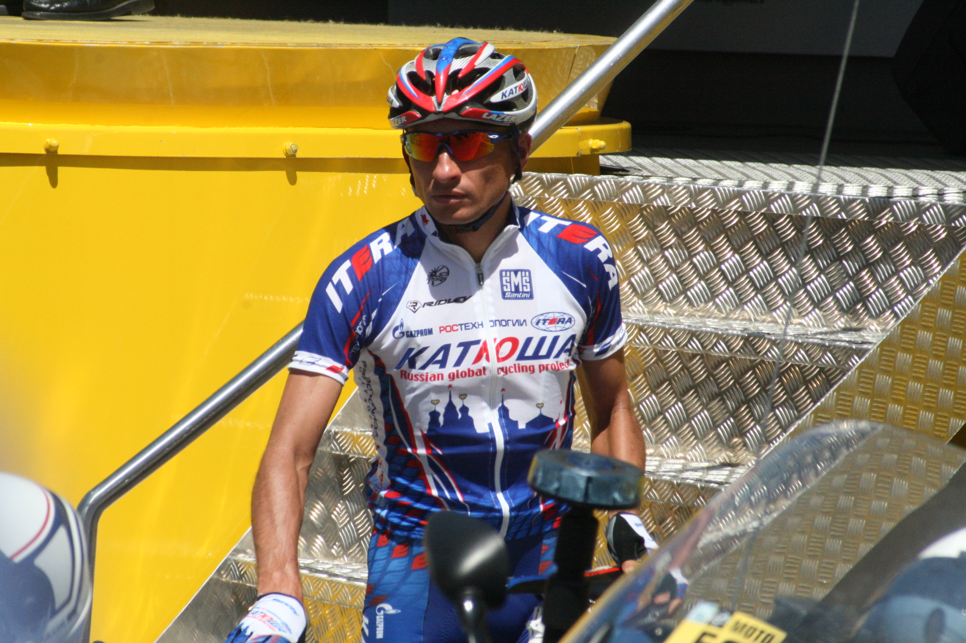 Départ de la 4e étape du Tour de France 2010 à Cambrai - Sergei Ivanov